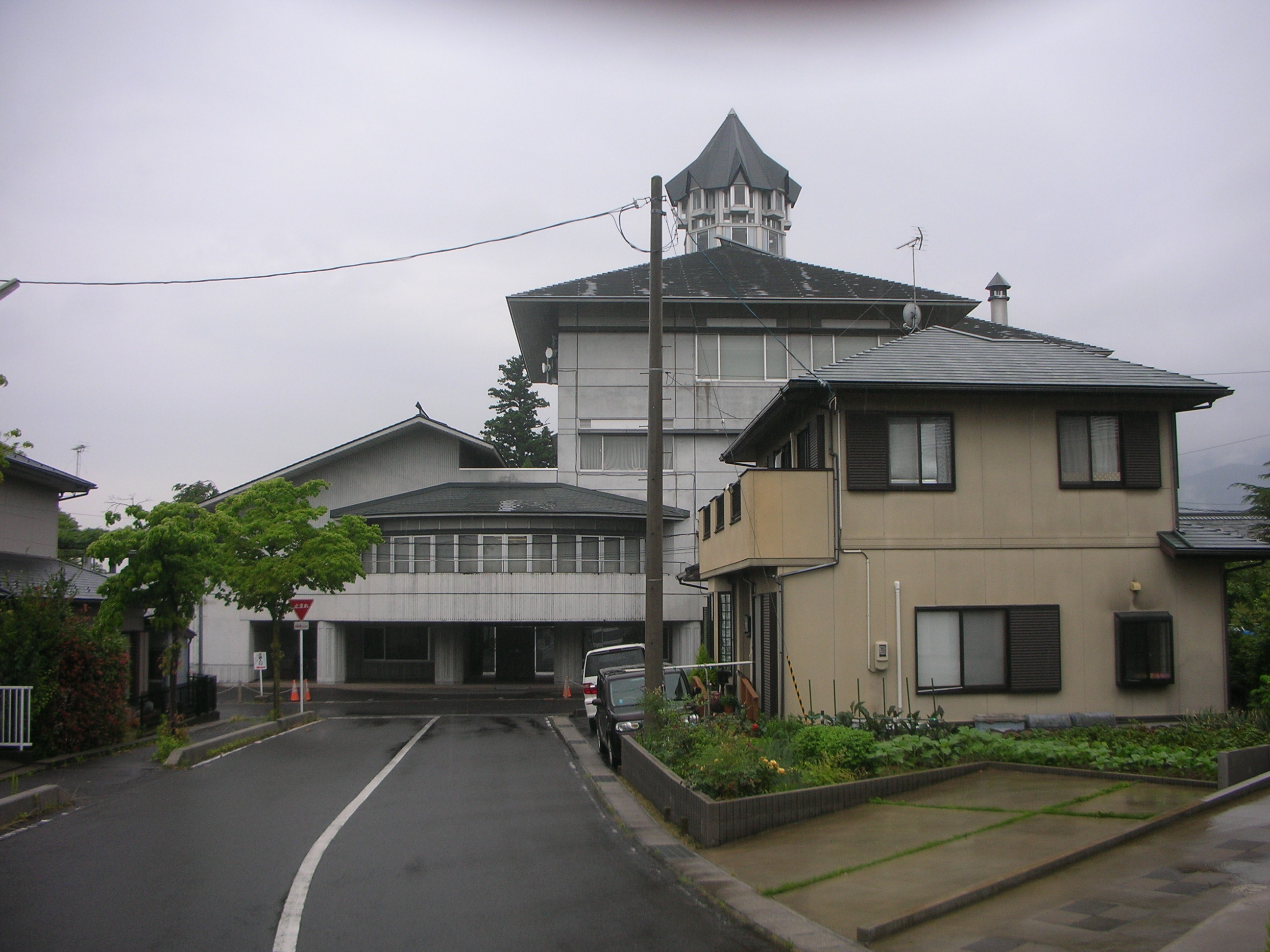 観月台文化センター